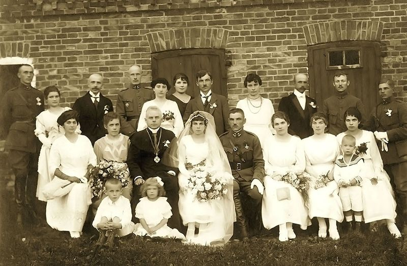 Vestuvės (jaunoji Stasė Vaitkutė, jaunasis Antanas Budrys, sutuokė – prelatas Konstantinas Olšauskas). Prie Kauno arkikatedros bazilikos, 1924 metai